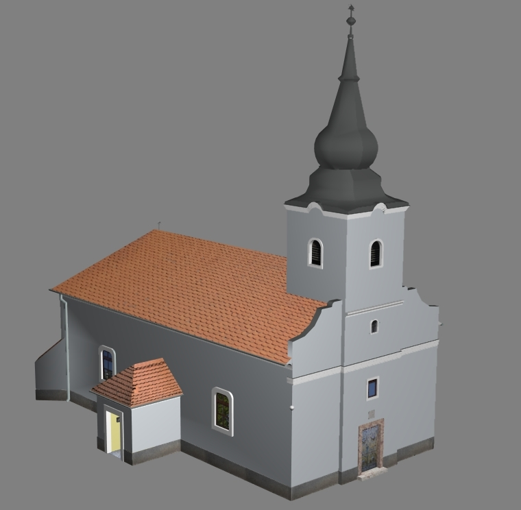 3d model